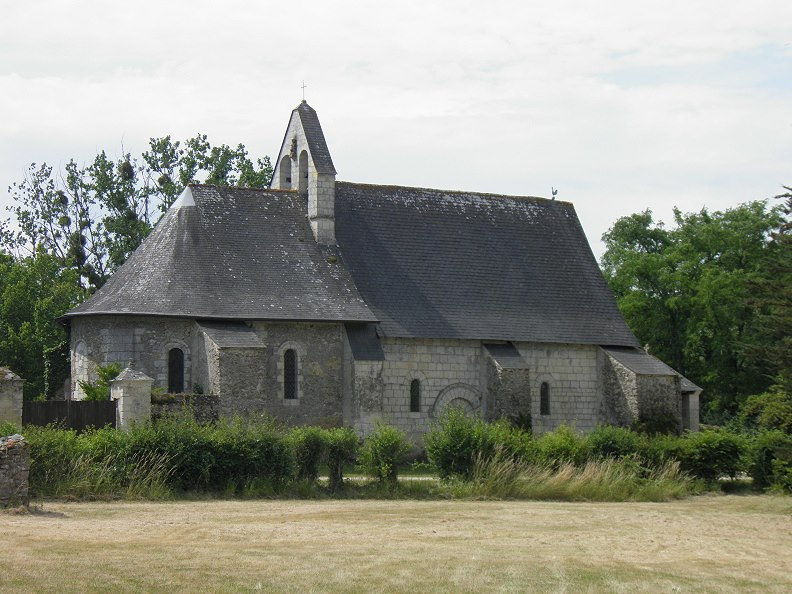 Église Saint-Jean de La Lande-Chasles (Maine-et-Loire, France), du XIIe siècle.